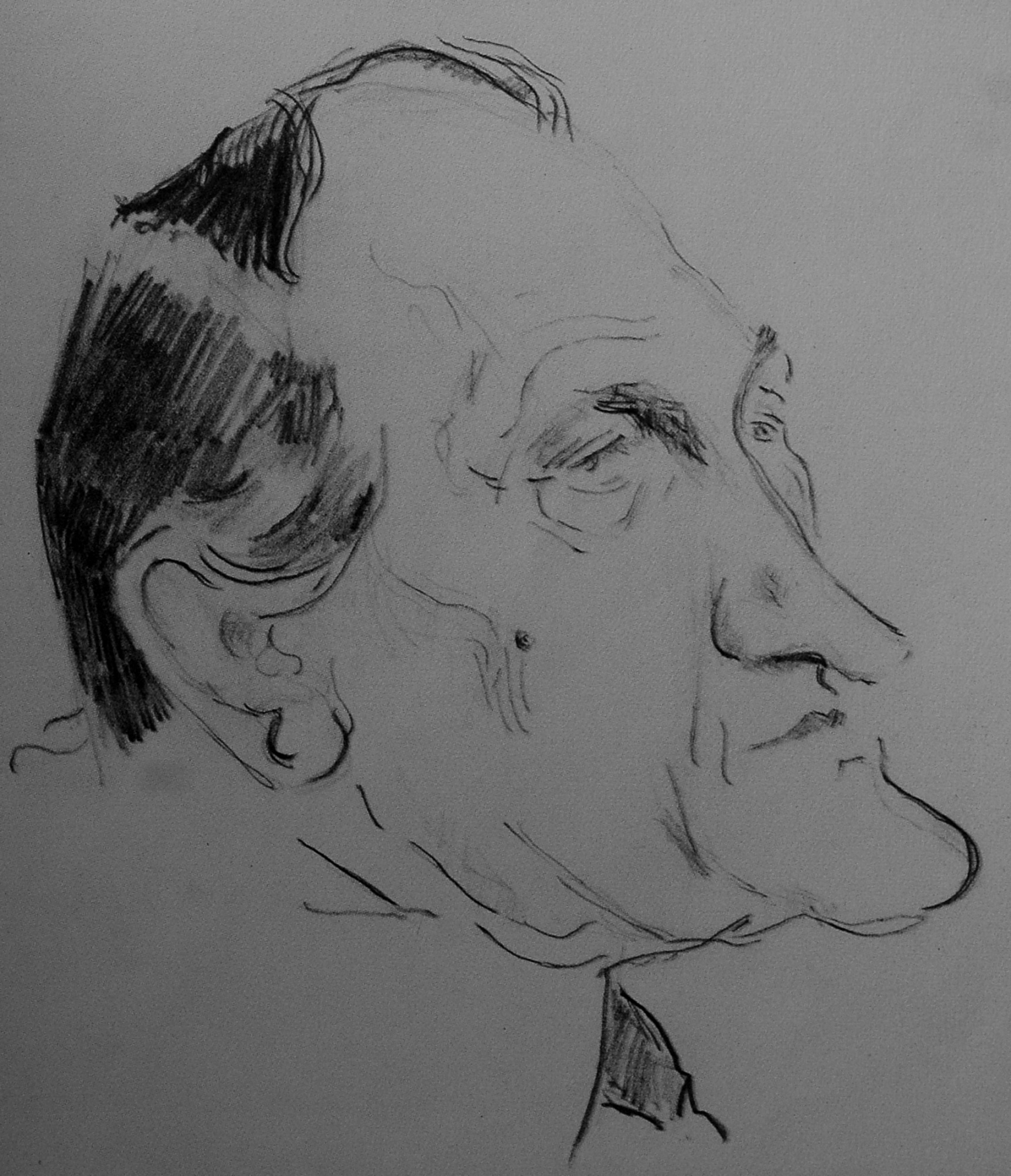 Karl Örbo. Karikatyrteckning av konstnärsvänner utförd av konstnären John Jon-And, utgiven postumt efter hans död 1941 i boken Konstnärer Gebers Förlag.